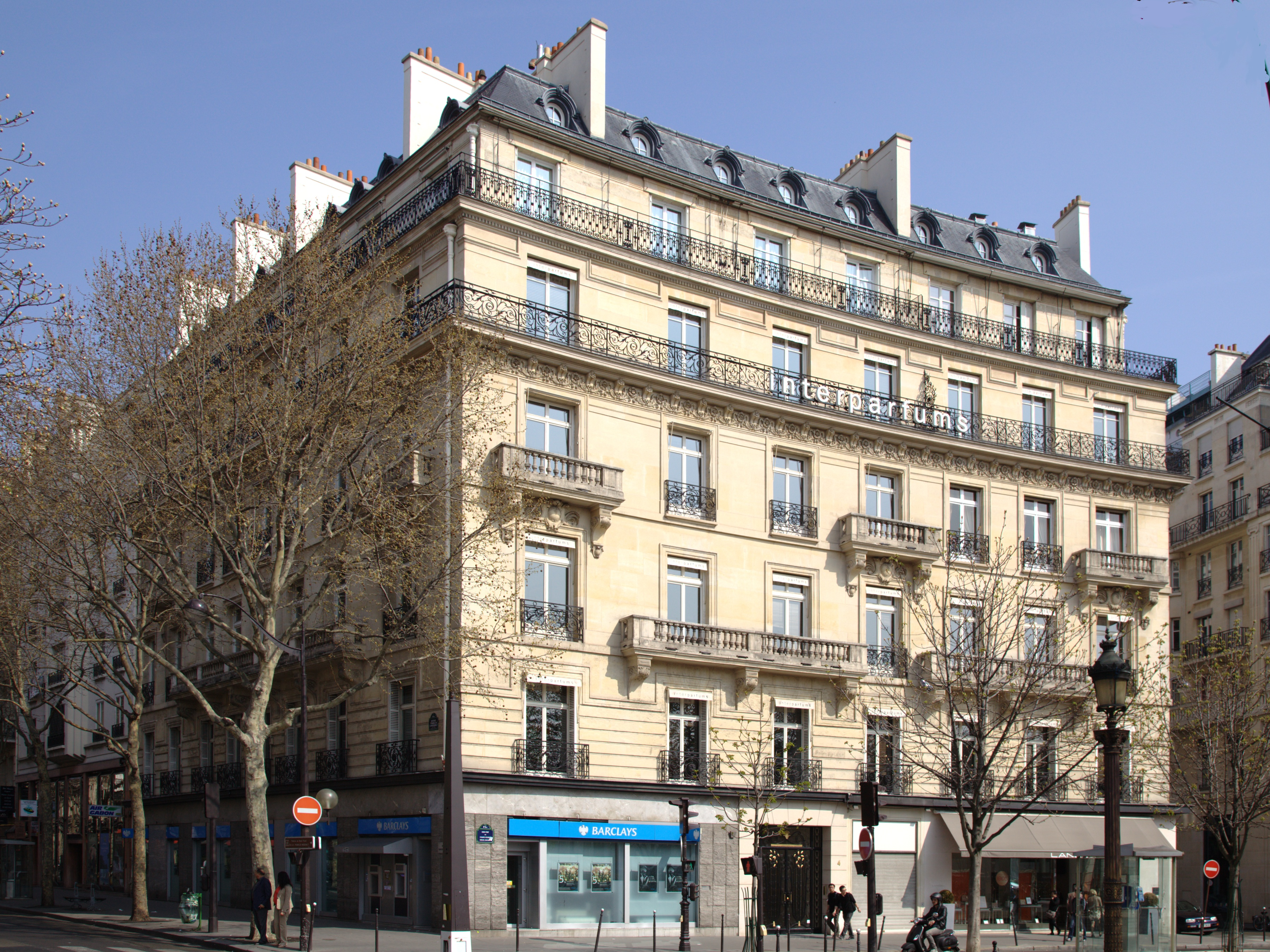 Immeuble au rond point des Champs-Élysées, no 4 et 6